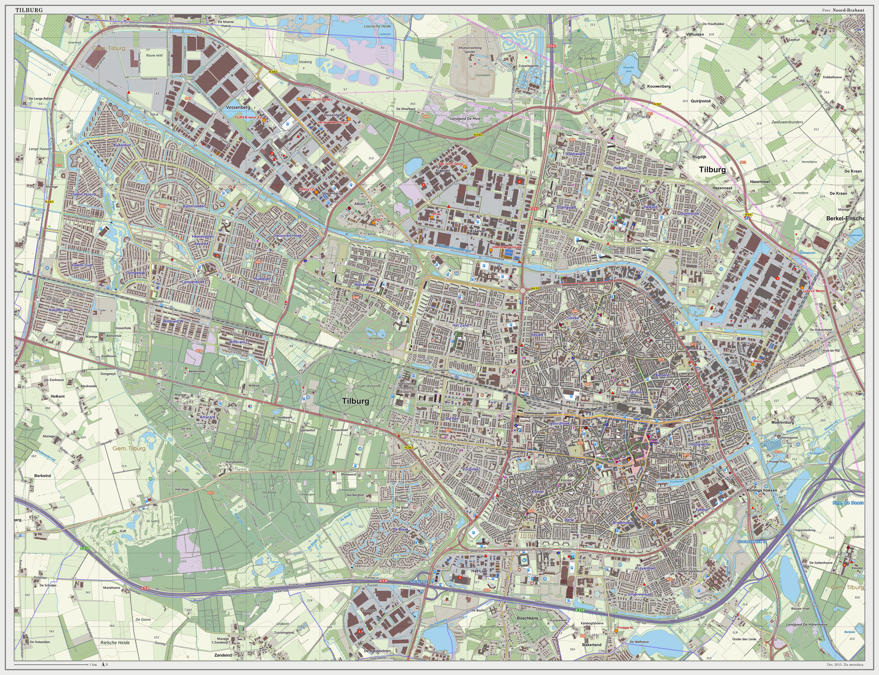 Topografische kaart van Tilburg (woonplaats). Kaartbeeld samengesteld op basis van de GML open geodata van de Top10NL en Top25namen (Basisregistratie Topografie, Kadaster 30-nov-2013), o.b.v. Creative Commons BY licentie. Gebouwvlakken uit Open Geodata BAG extract (8-dec-2013). Wegen uit de Open Street Map (15-dec-2013). Samenstelling en kleurenschema: Jan-Willem van Aalst, met QGIS2 en Adobe Photoshop. Zie ook de Legenda.